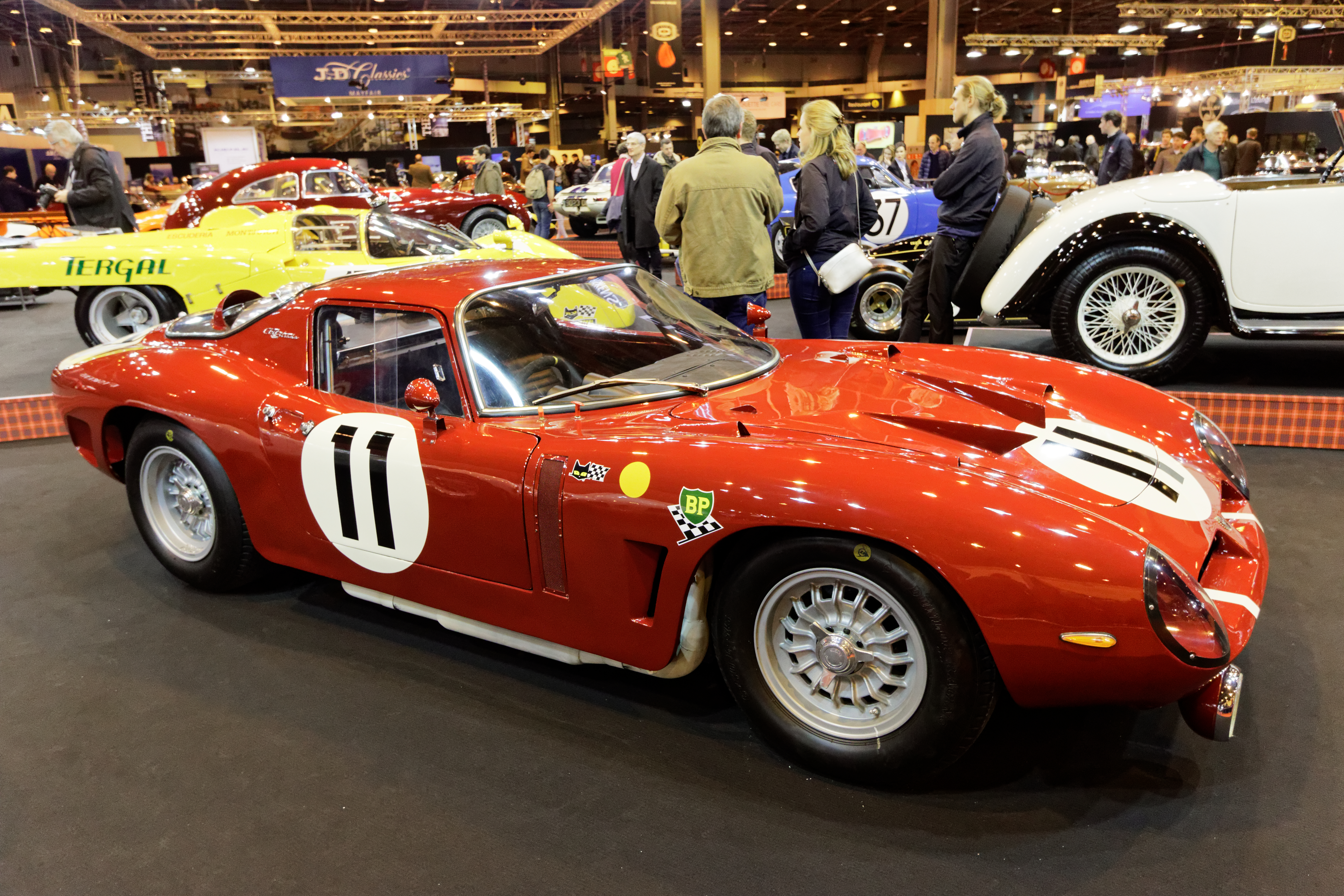 Une Bizzarrini Competition Lightweight Coupé de 1966 exposée lors du salon Rétromobile 2016.